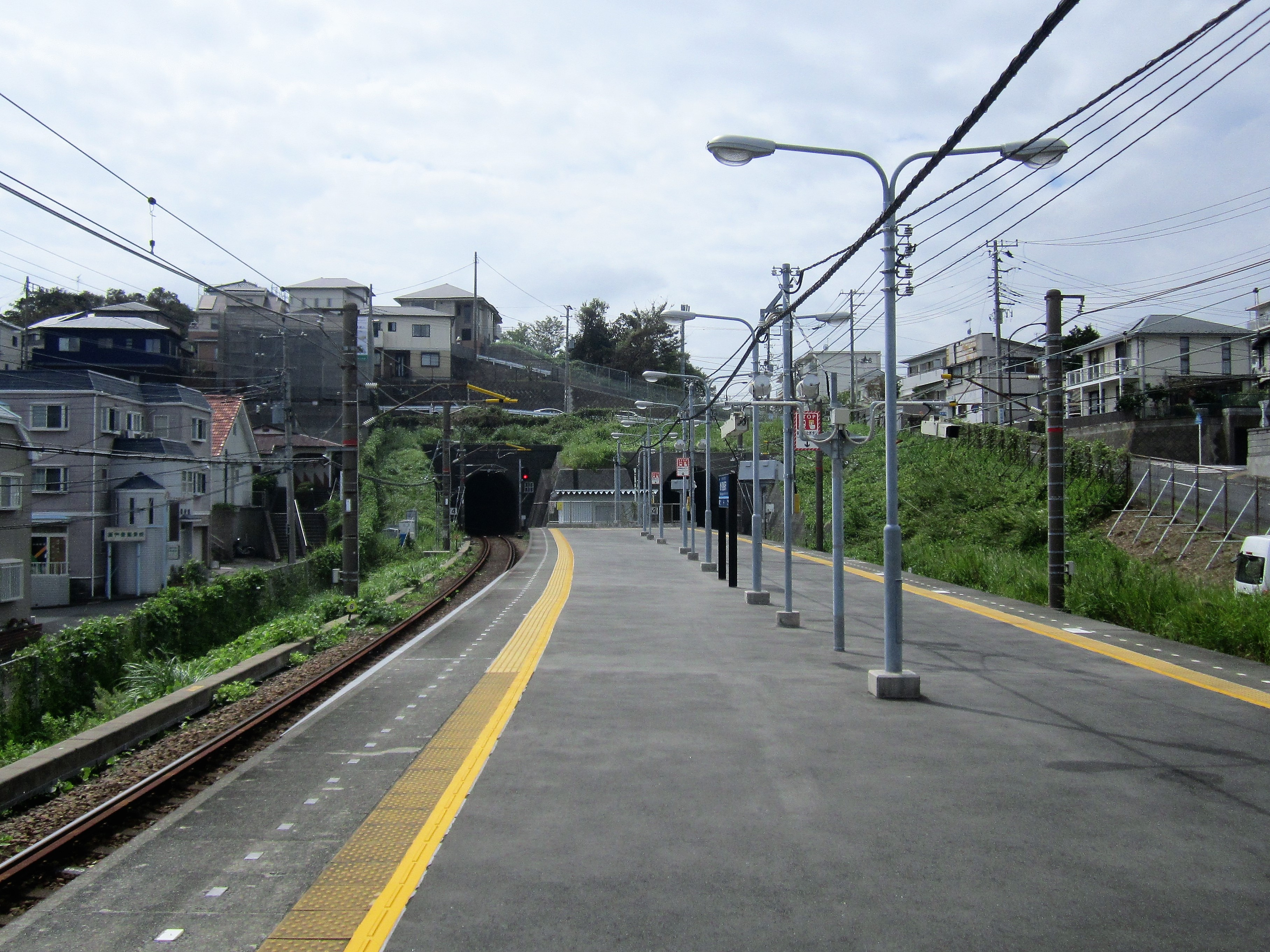 京急長沢駅ホームから三崎口方面を望む